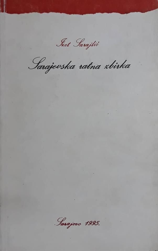 Naslovna strana knjige Sarajevska ratna zbirka Izeta Sarajlića.